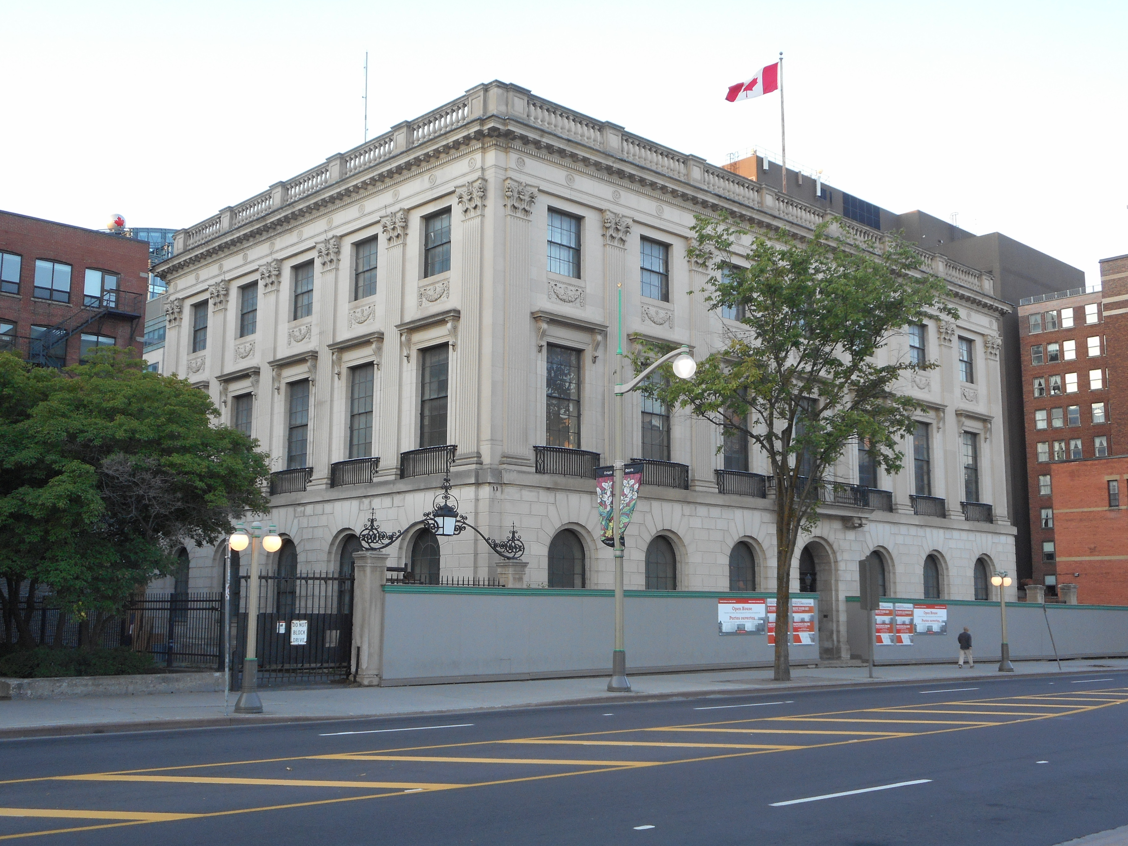 100, rue Wellington, Ottawa L'ancienne adresse de l'ambassade des États-Unis, acquise par la Commission de la capitale nationale, se cherche une nouvelle vocation.